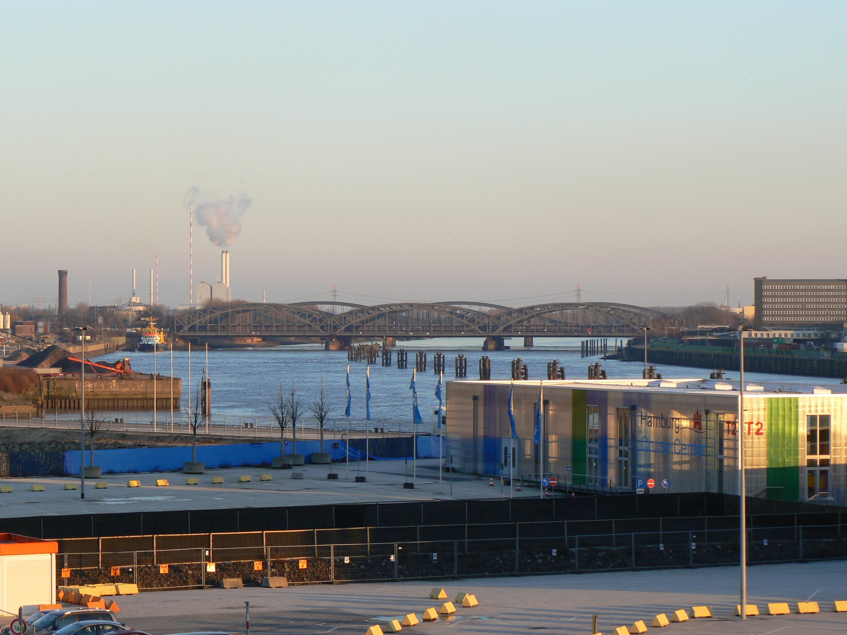 Blick auf die Elbbrücken vom Cruise Center aus